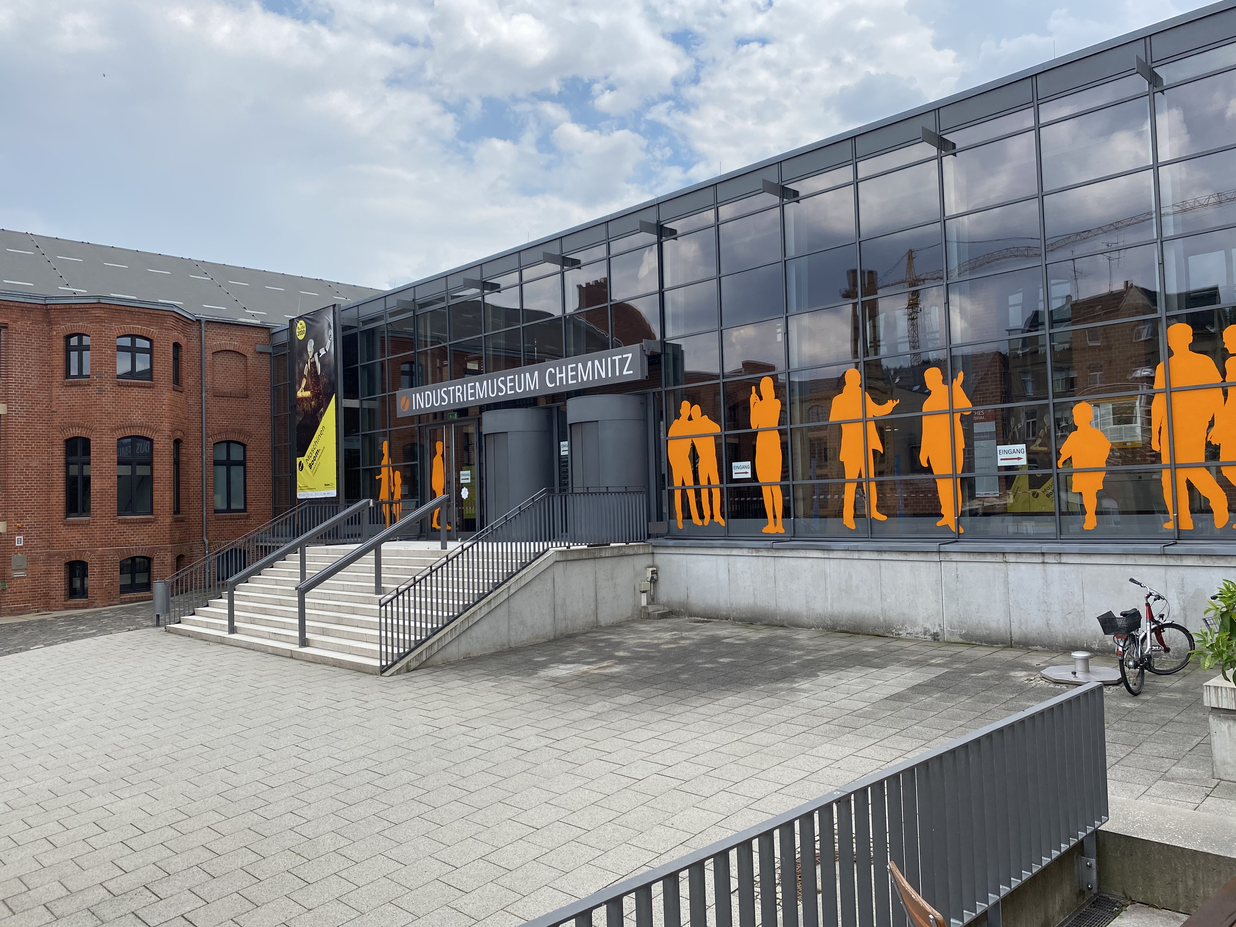 Eingang Industriemuseum Chemnitz (2020)